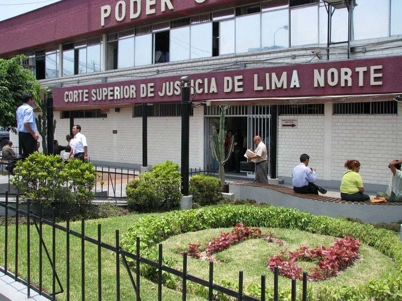 Corte Superior de Justicia de Lima Norte